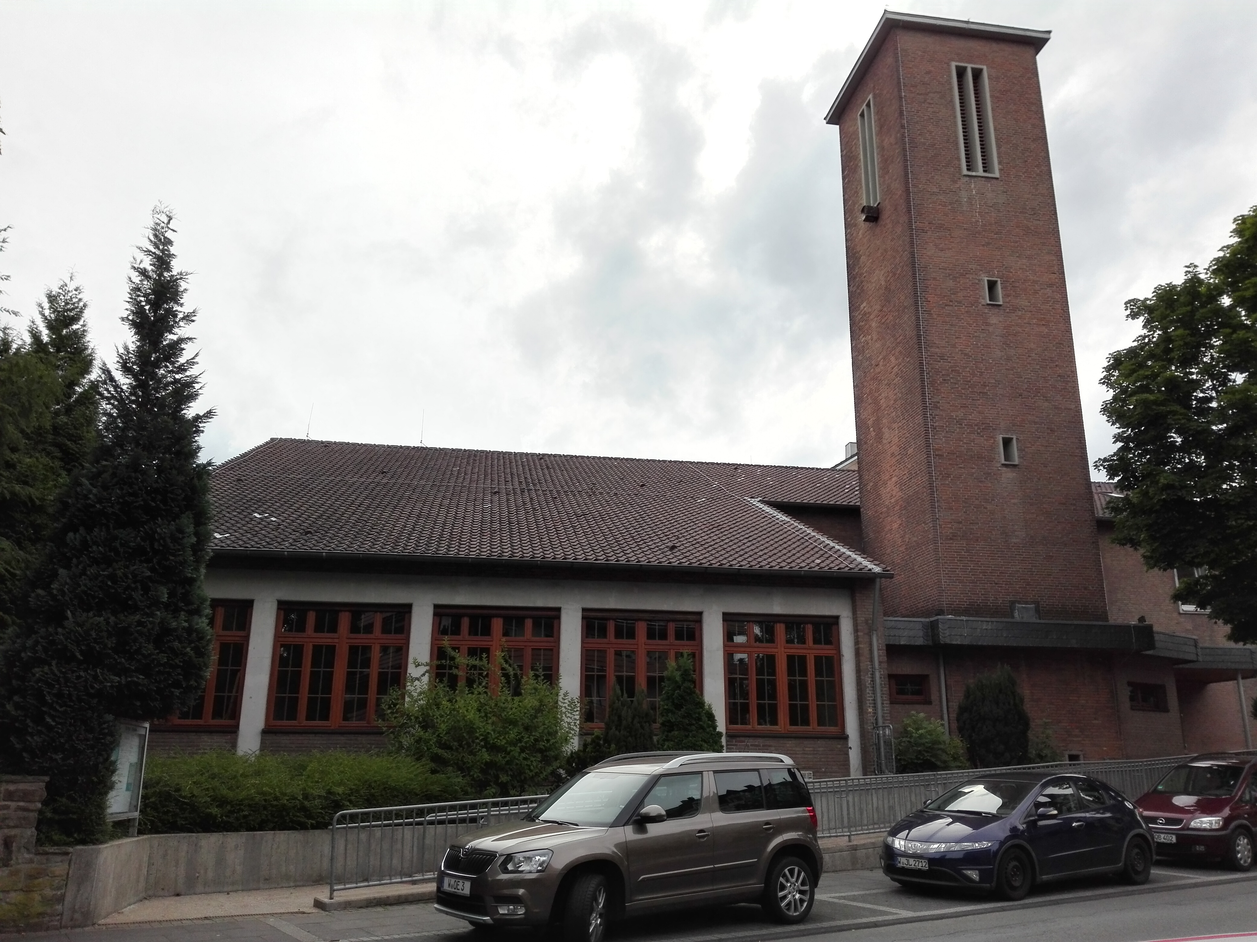 Ansichten der Rotter Kirche in Wuppertal-Unterbarmen